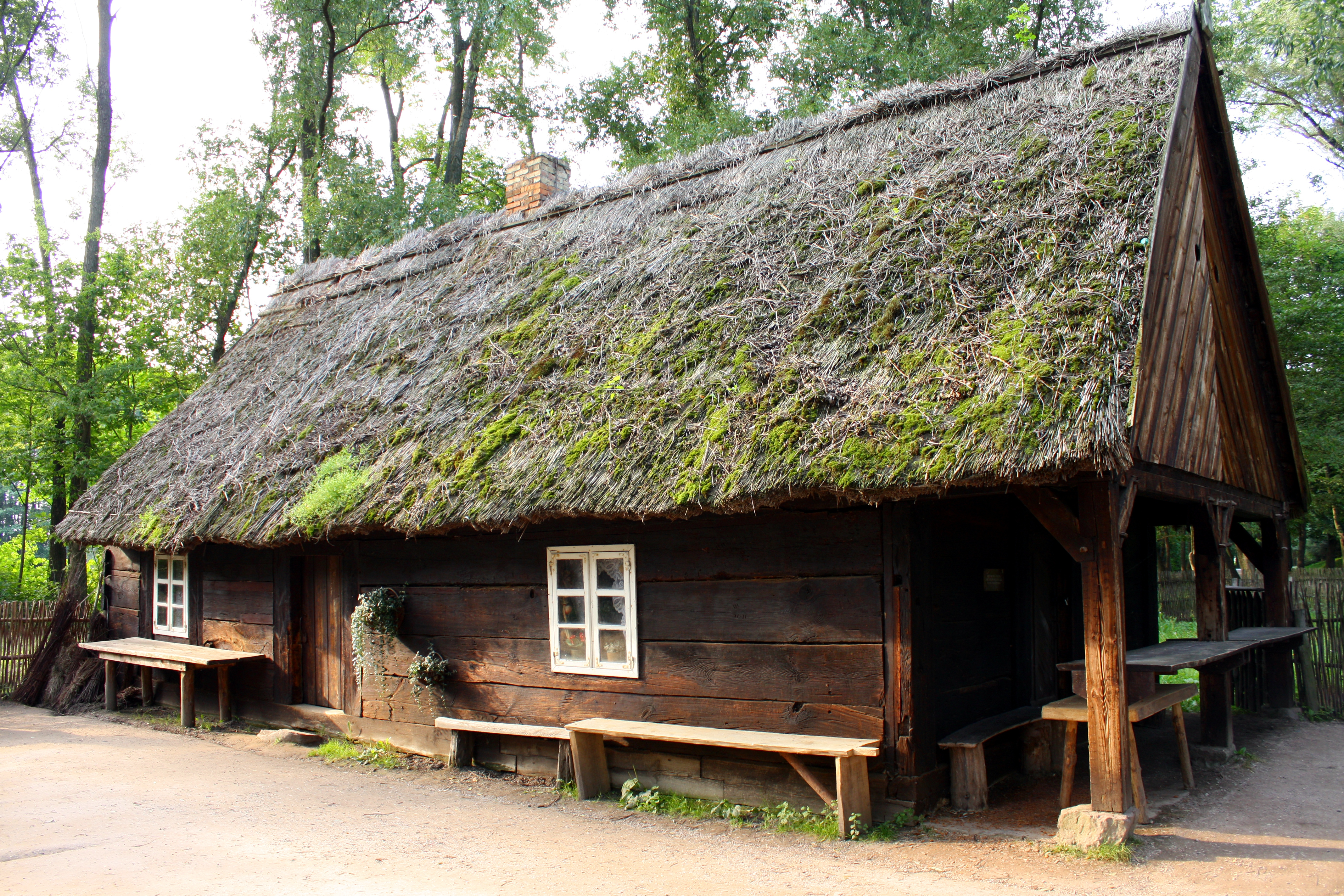 Biskupin, drewniany dom wąskofrontowy, podcieniowy, z Pałuk, na terenie Muzeum Archeologicznego, XIX, 1969